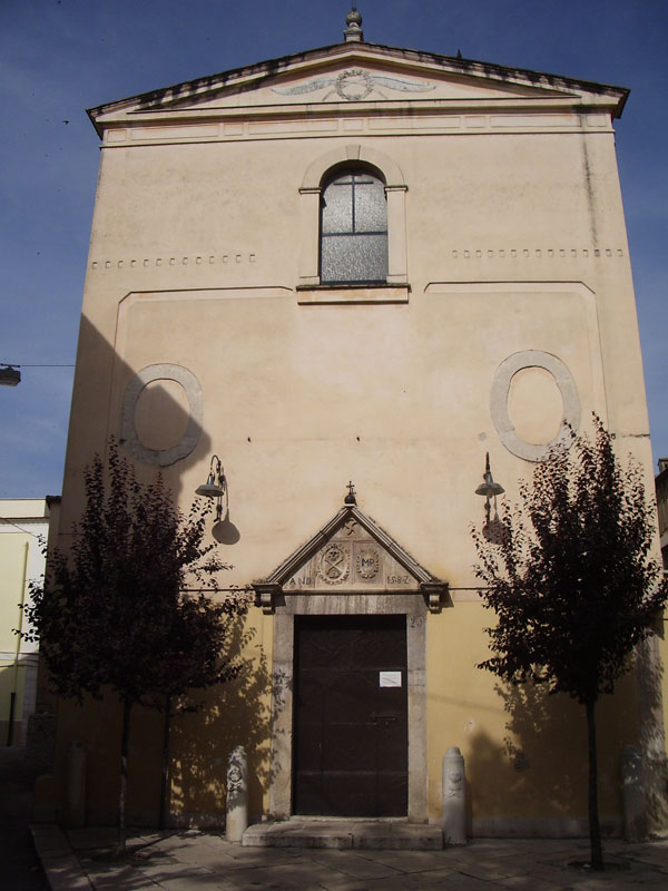 Facciata della Chiesa del Purgatorio di Cerignola (FG).